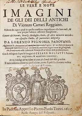 Vicenzo CARTARI (1531-c.1571) - Le vere e nove imagini de gli dei delli antichi di Vicenzo Cartari reggiano. Publicado em Pádua, por Pietro Paolo Tozzi, na stampa del Pasquati, em 1615.